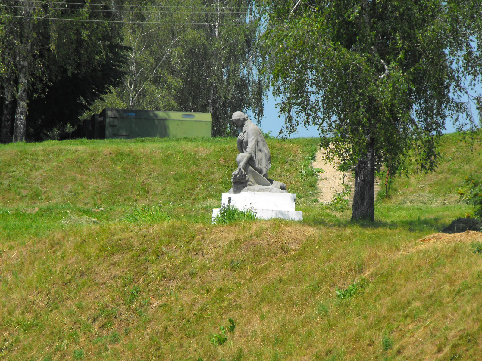 Памятник "Скорбящая мать" на месте массового убийства в октябре-ноябре 1942 года евреев - узников Воложинского гетто. Находится на территории городского стадиона, расположенного между улицами Белорусской, Набережной и Комарова.